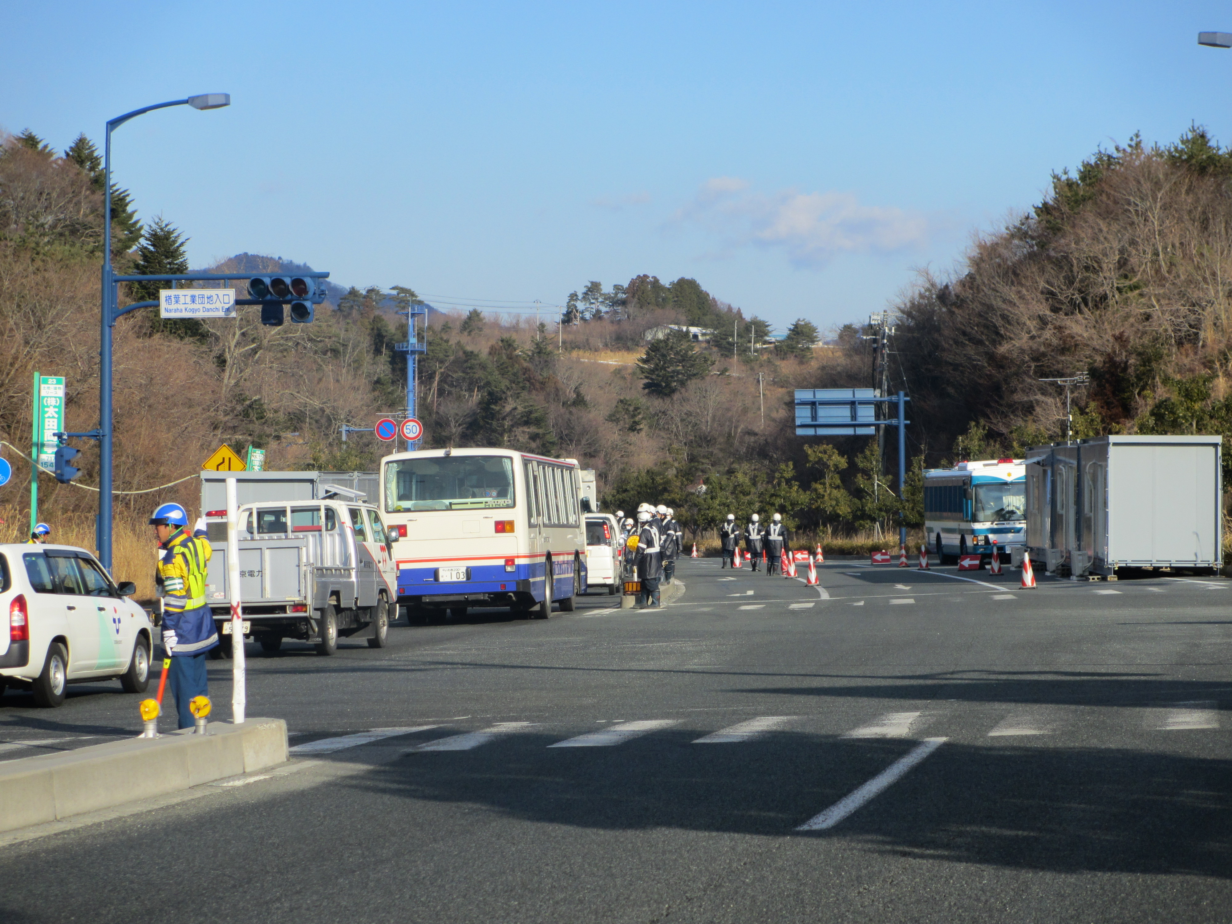 福島県楢葉町、国道6号で撮影。ここから先が警戒区域。